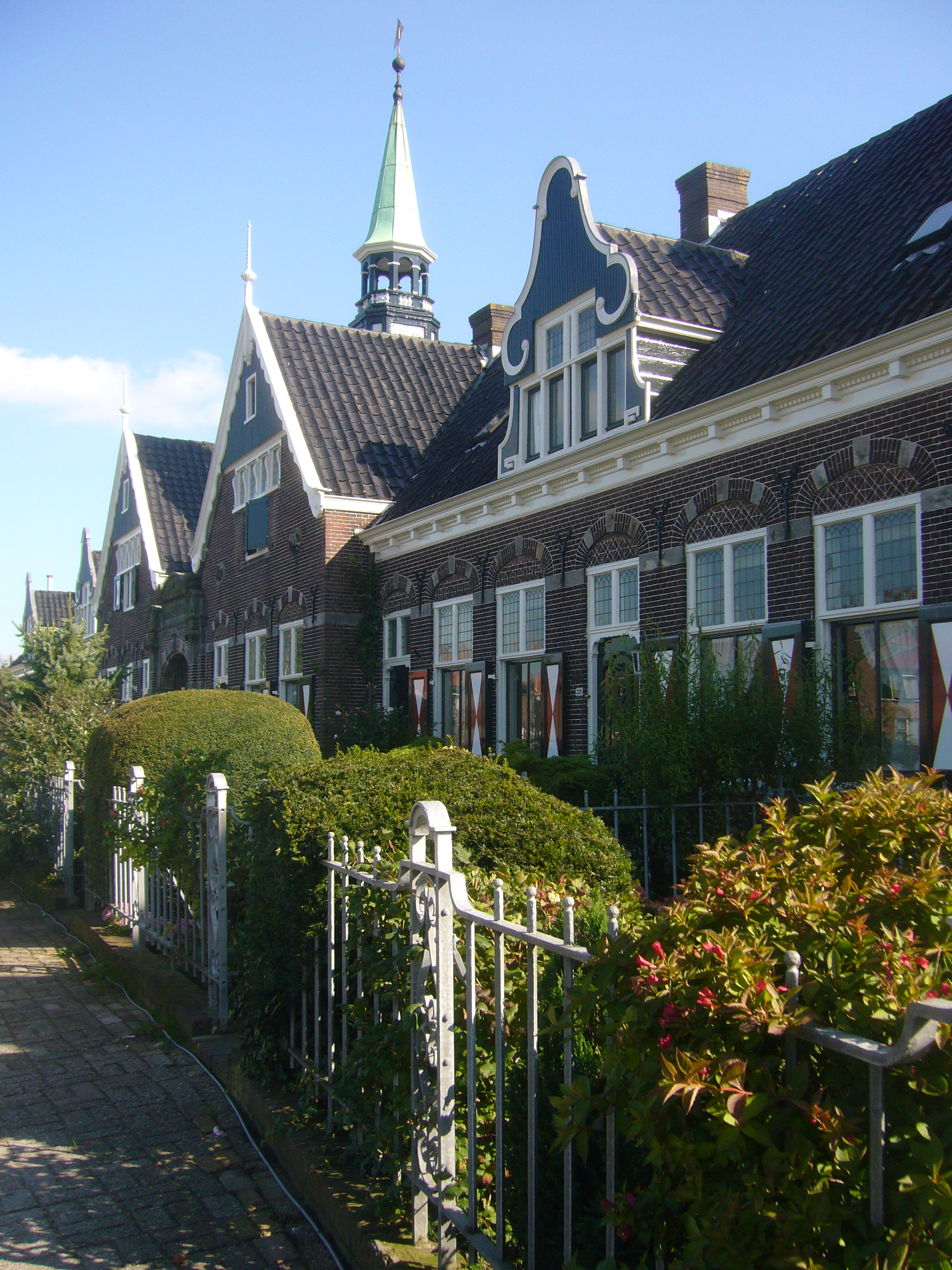 't Hof Saenden Billitonkade 31-40 Wormerveer Gebouwd in 1915